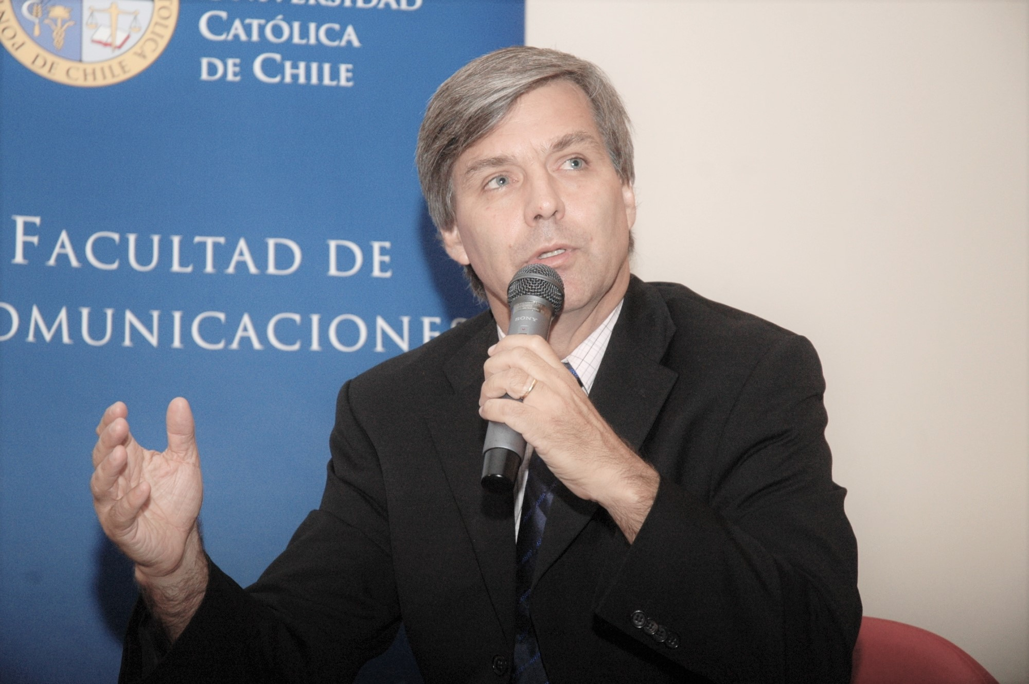 "Los chilenos ven a la selección de fútbol como uno de los principales elementos de unión nacional" Así lo destacó el director de la ANFP, Harold Mayne-Nicholls, en una cita con estudiantes de Periodismo. En el marco de un nuevo ciclo de la jornada “Viernes de Medios”, que organiza la Facultad de Comunicaciones UC, el dirigente reveló una encuesta de la empresa Adimark, en que un 85,8% califica con nota 6 y 7 la importancia del equipo como motivo de unión del país.